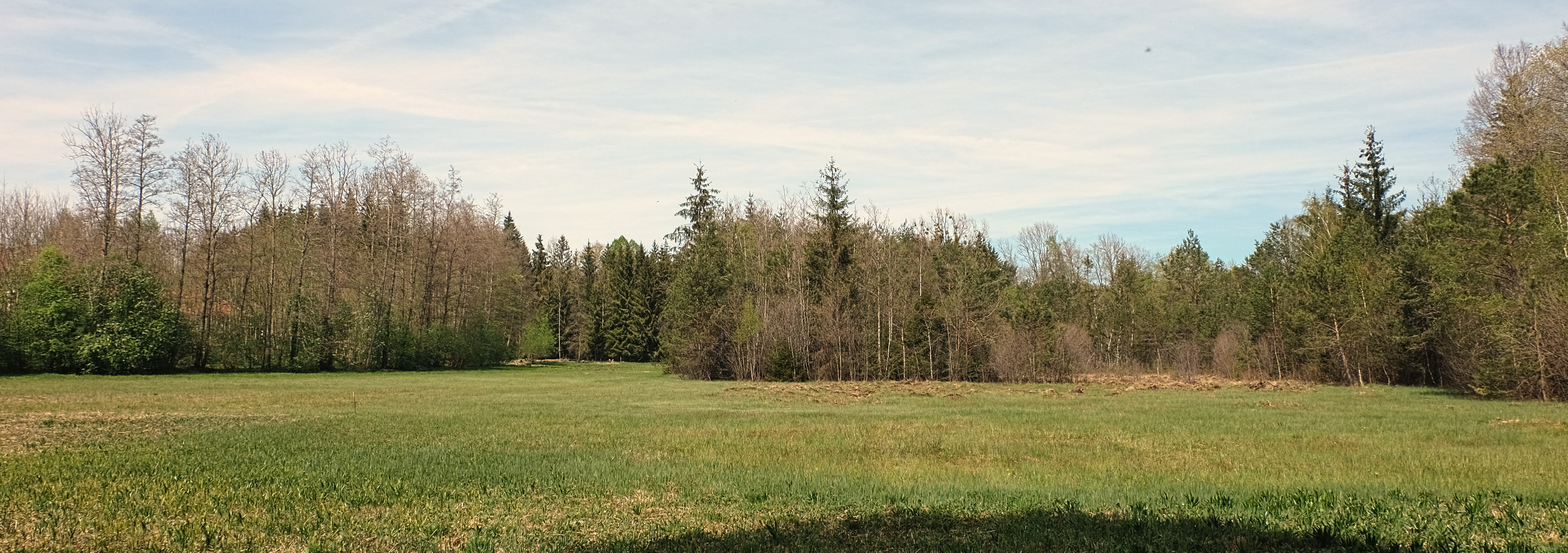 Verlandeter See bei Haigermoos, Gemeinde Palling, Lkr. Traunstein, Naturdenkmal